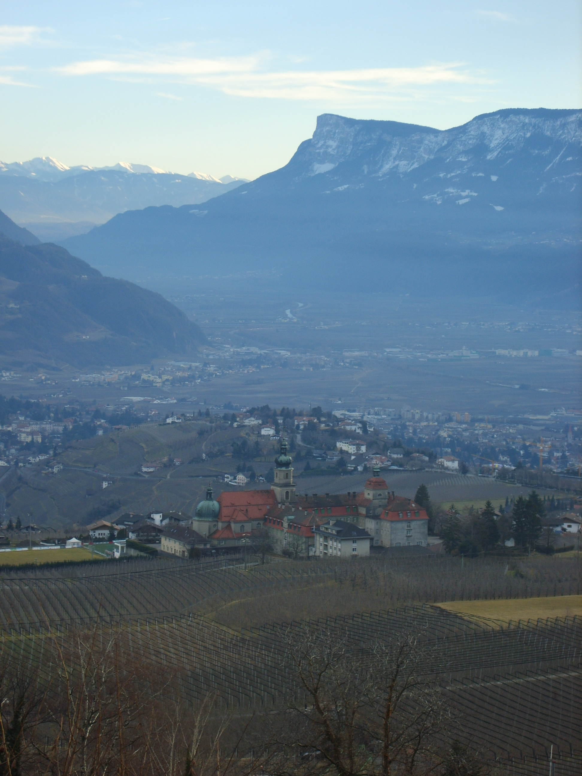 Seminar Johanneum Dorf Tirol Nordansicht